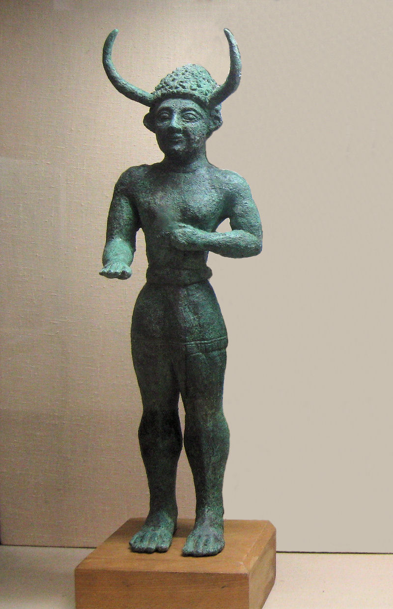 Gehörnter Gott, Enkomi, 12. Jhd. v. Chr.